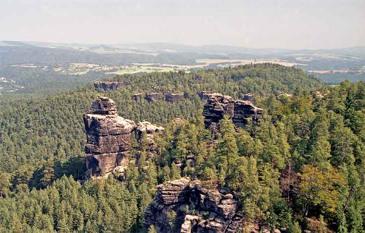 pohled z úbočí Papststeinu směrem ke stolové hoře Kleinhennesdorfer Stein